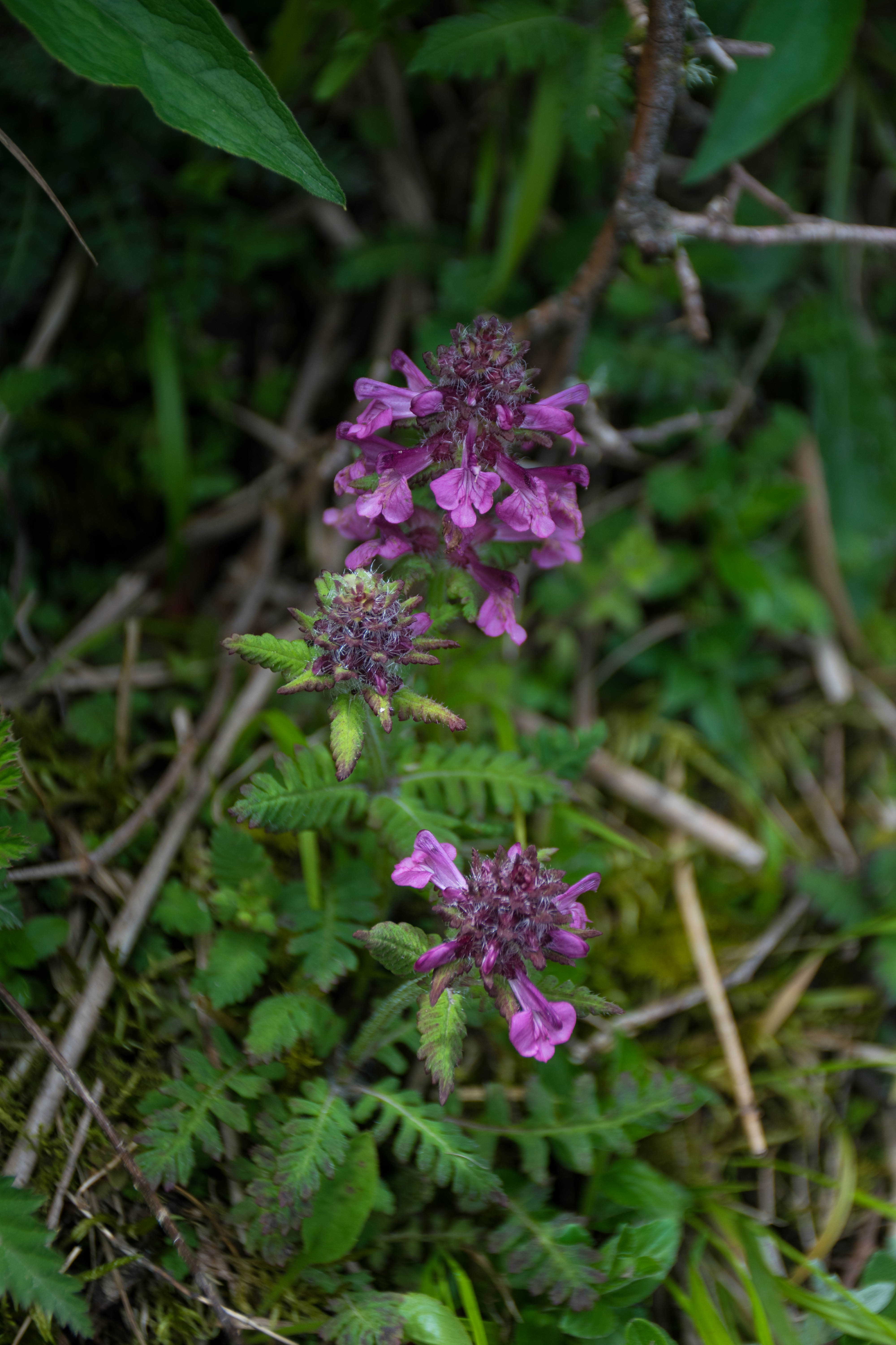 馬先蒿的花，2016/05/29攝於奇萊山